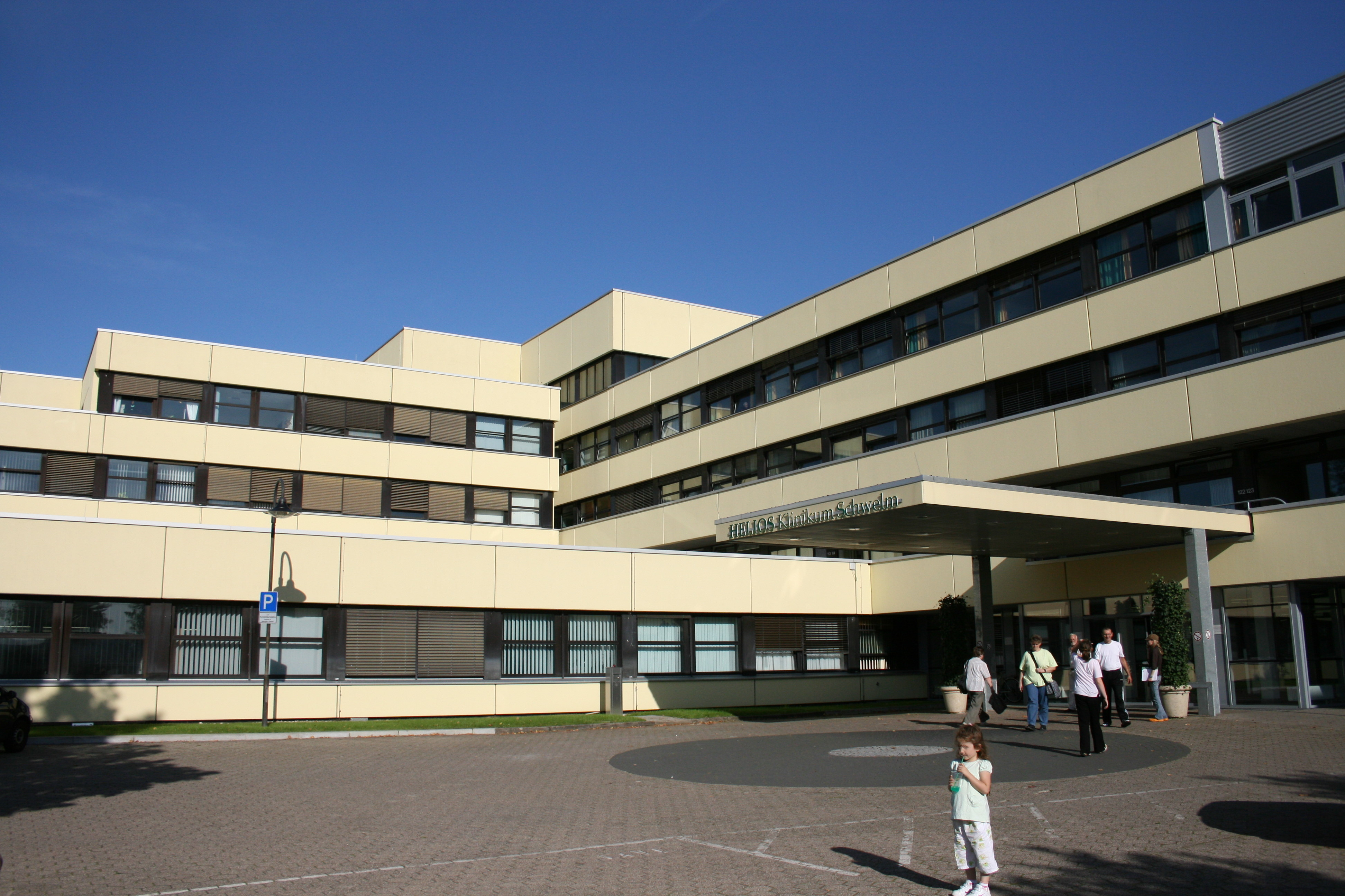 Helios Klinikum Schwelm auf dem Martfeld in Schwelm